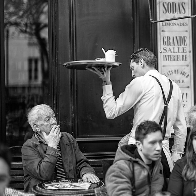 café s'il vous plaît